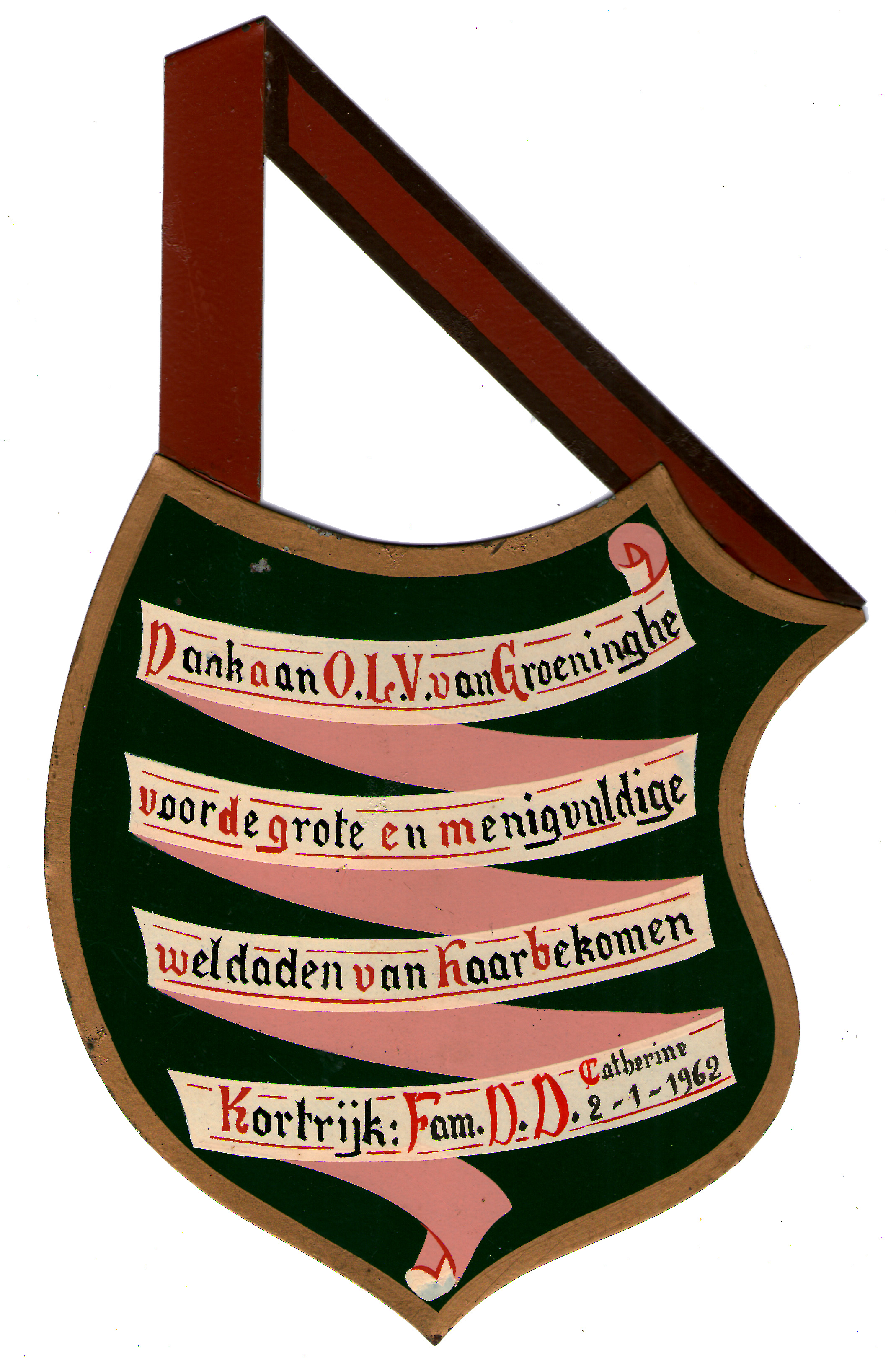 Ex-Voto traditionnel à Notre Dame de Groeninghe, une dévition locale de la ville de Courtrai, en Belgique Traditionele ex-voto voor Onze-Lieve-Vrouw van Groeninge, te kortrijk, België. Traditional ex-voto to Our Lady of Groeninghe, a local devotion in the city of Kortrijk, in Belgium.